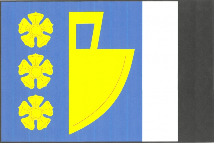 Vlajka, Víska u Jevíčka, okres Svitavy